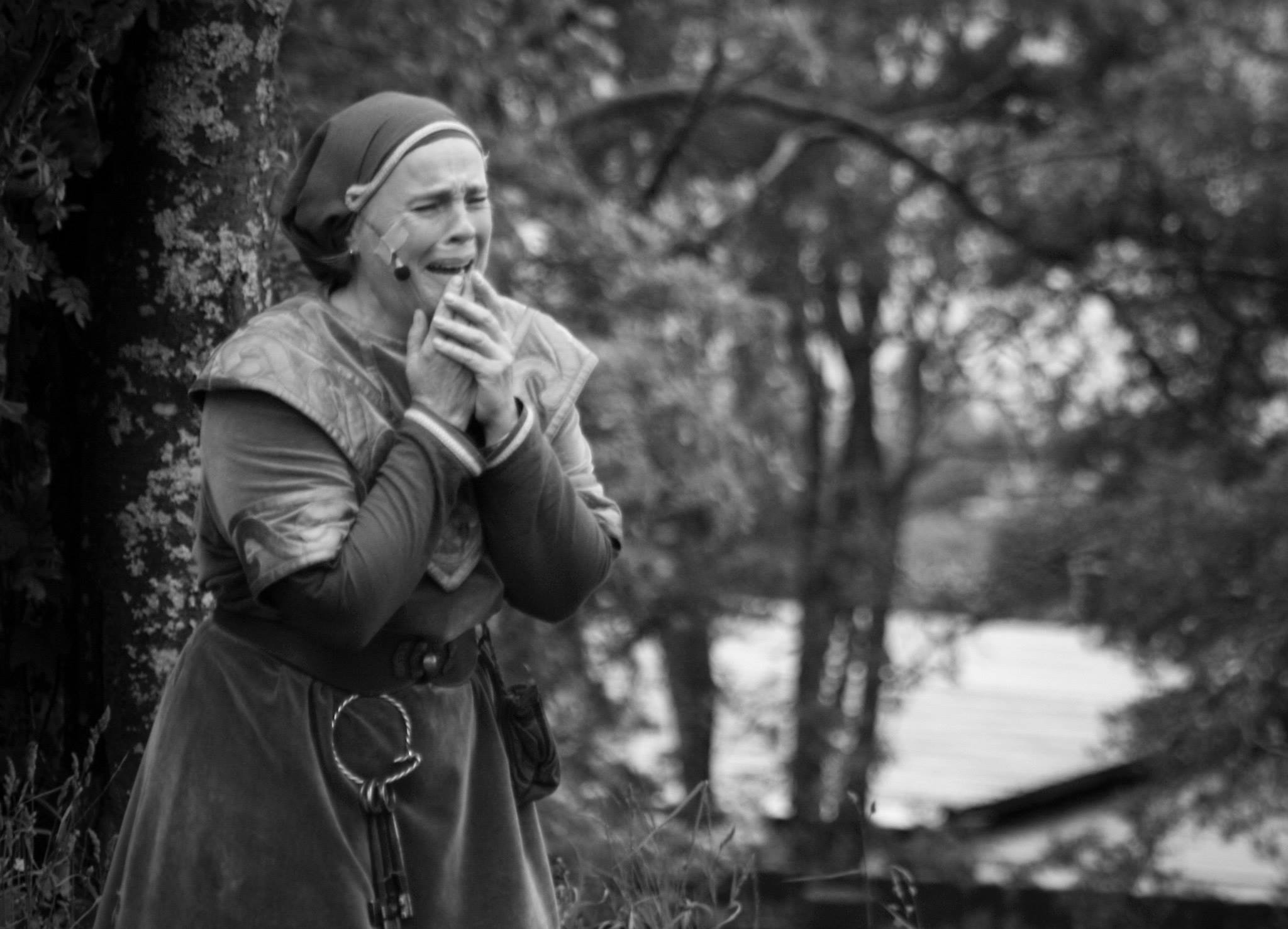 Unn Hallbrandsdotter (Anna Frisk). Arnljotspelen 2015. Regi: Stefan Moberg.